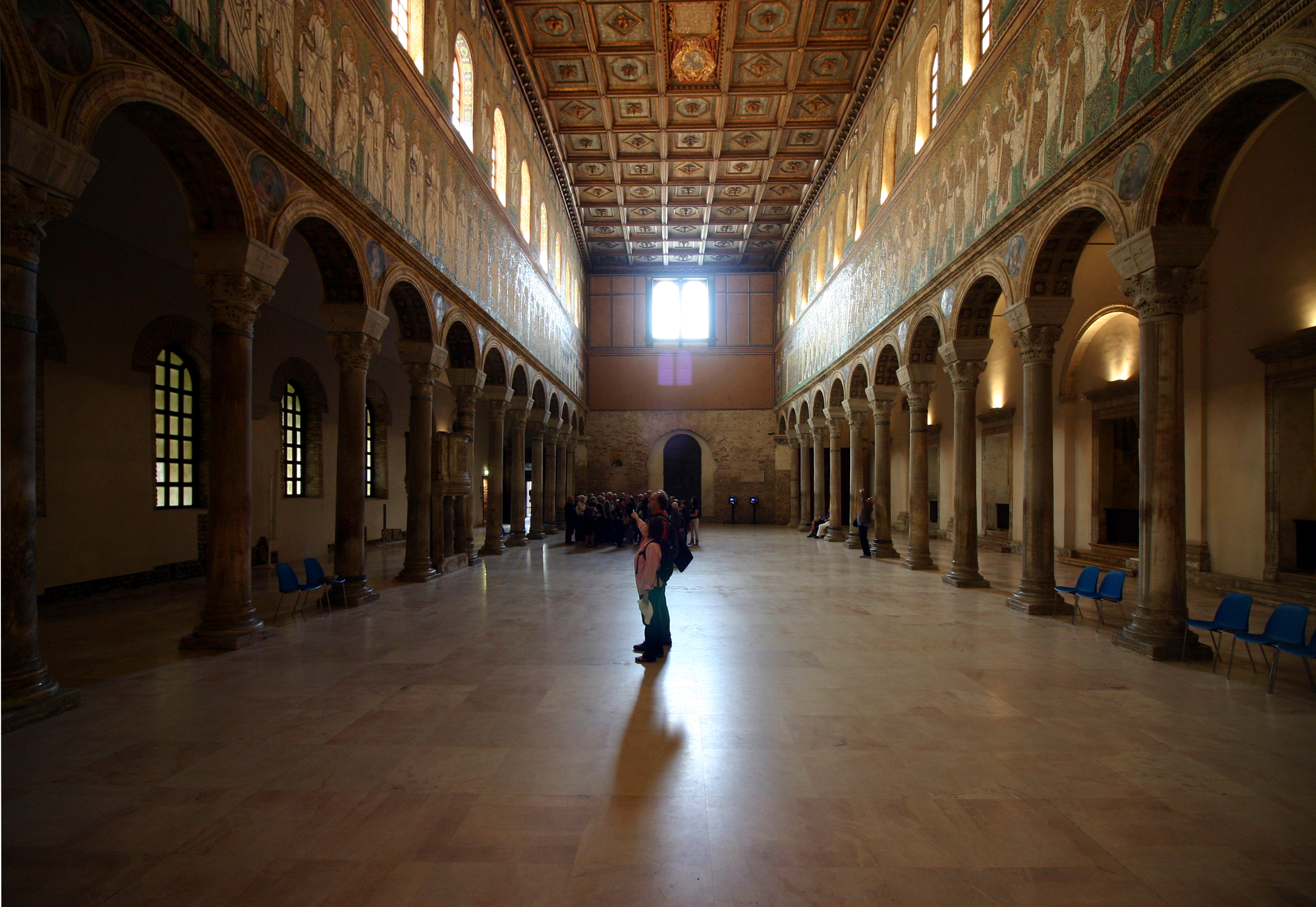 Sant'Apollinare Nuovo - Ravenna